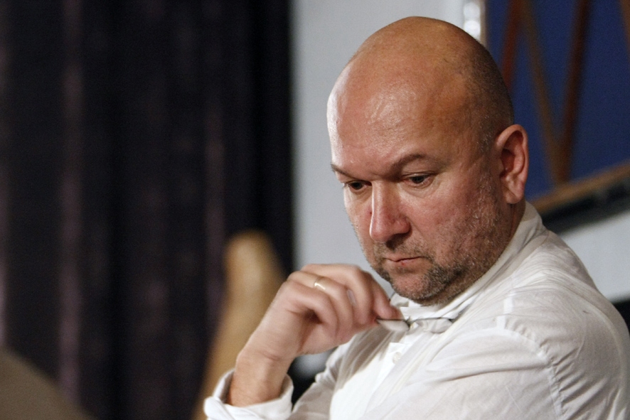 Peeter Pere